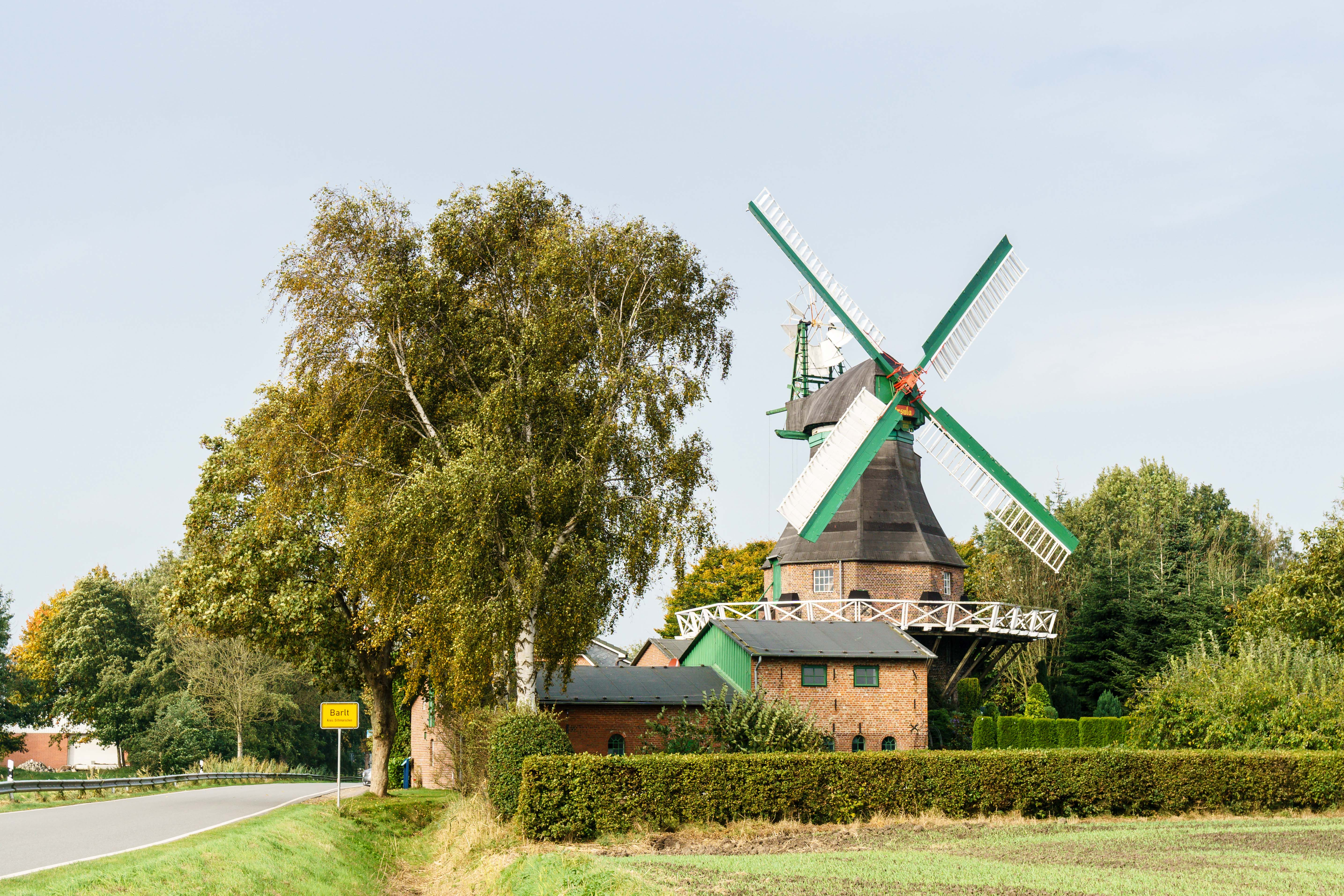 Galerieholländermühle Ursula, Mühlenstraße 5 in Barlt. Denkmal-ID 554